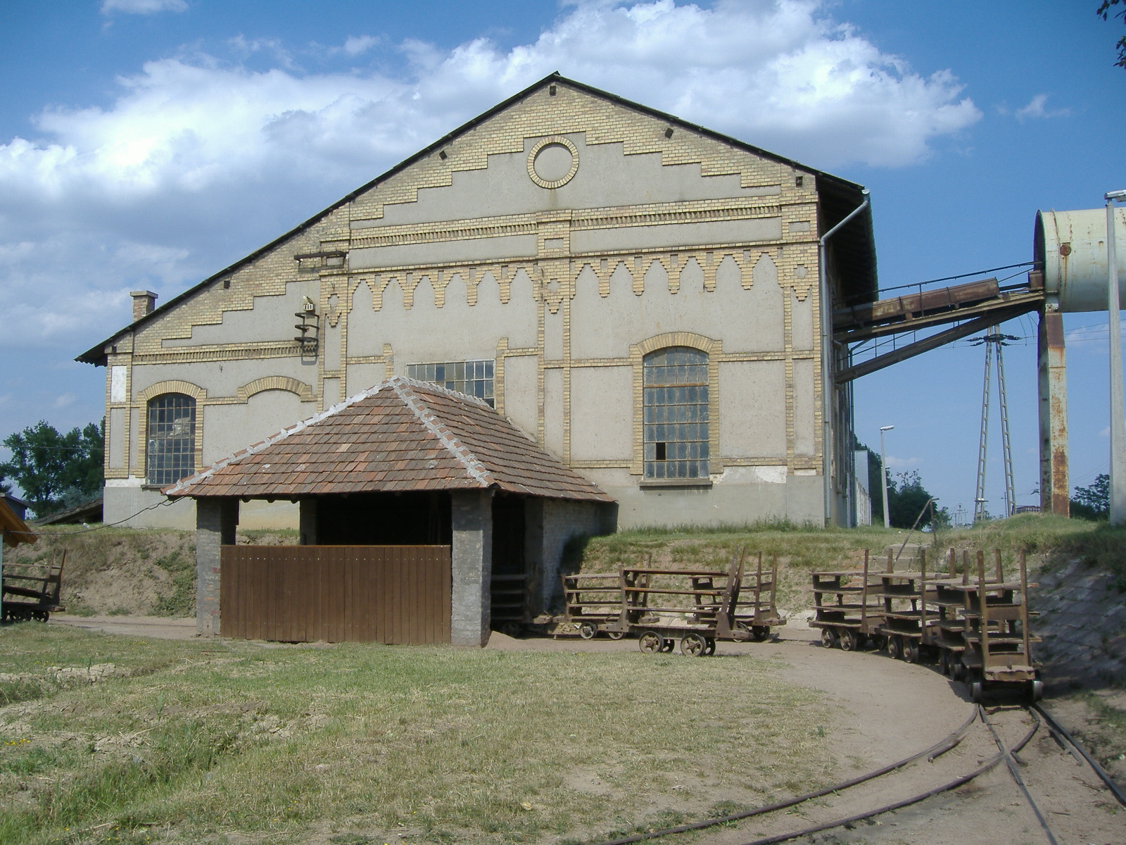 A törökszentmiklósi téglagyár épültete (présháza). 1908-1909-ben épült, korábban villanytelepként szolgált. A kép 2007.07.10-én készült Törökszentmiklóson